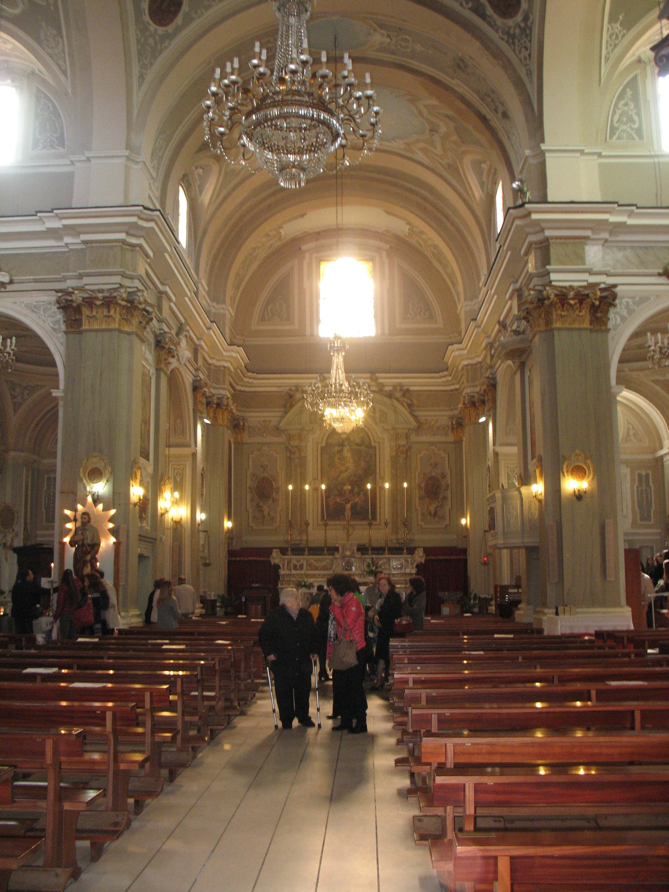 Navata centrale della settecentesca chiesa di Santa Maria Maggiore, parrocchia del centro storico di Villamagna (CH)